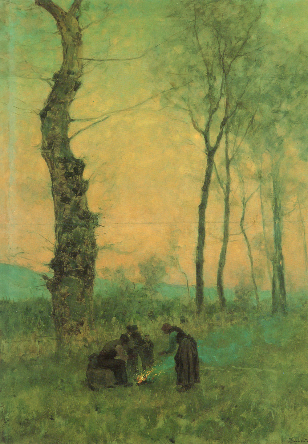 Paisaxe de inverno